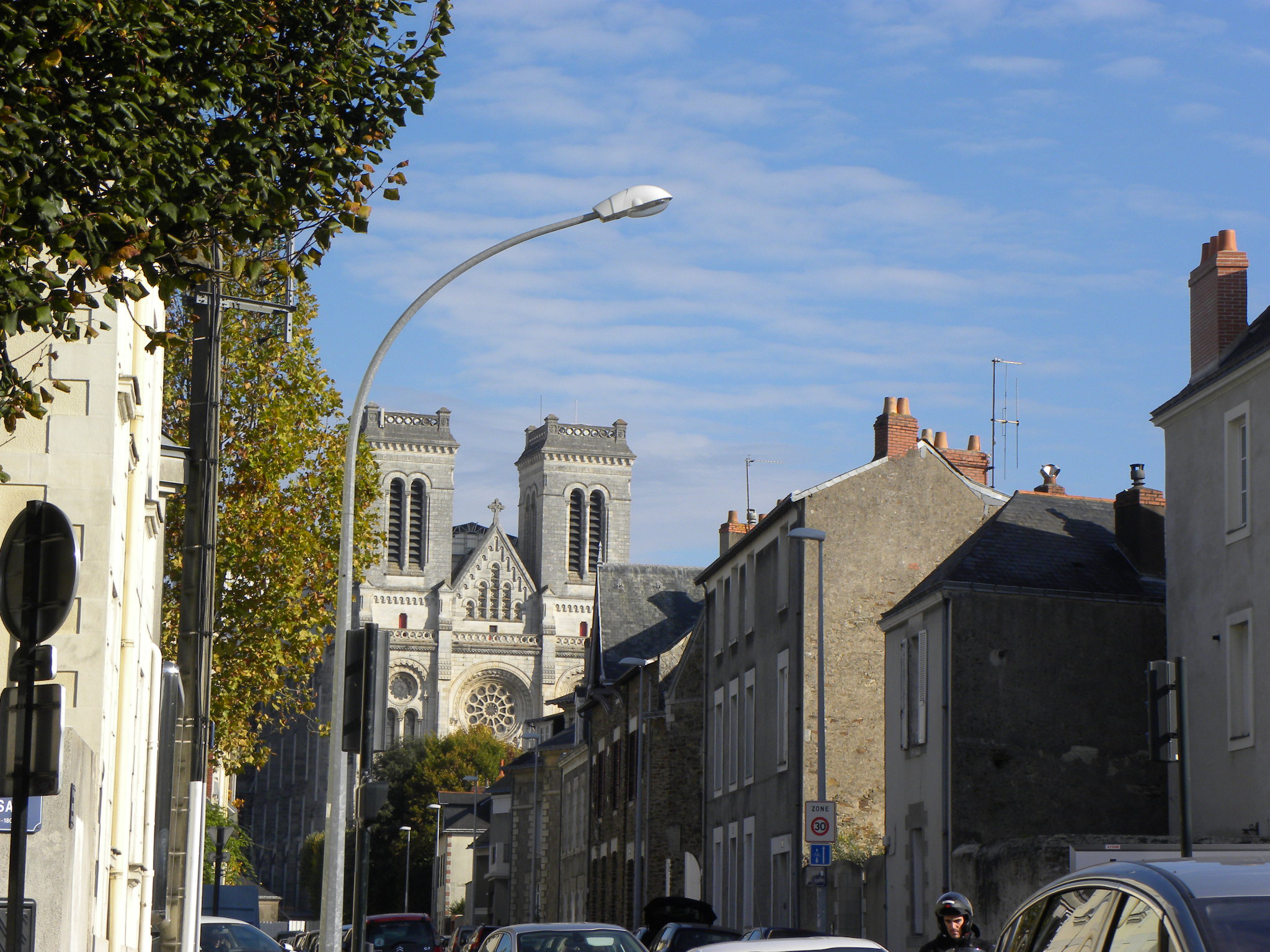 rue Saint Rogatien, au départ de la place Alfred Lallié